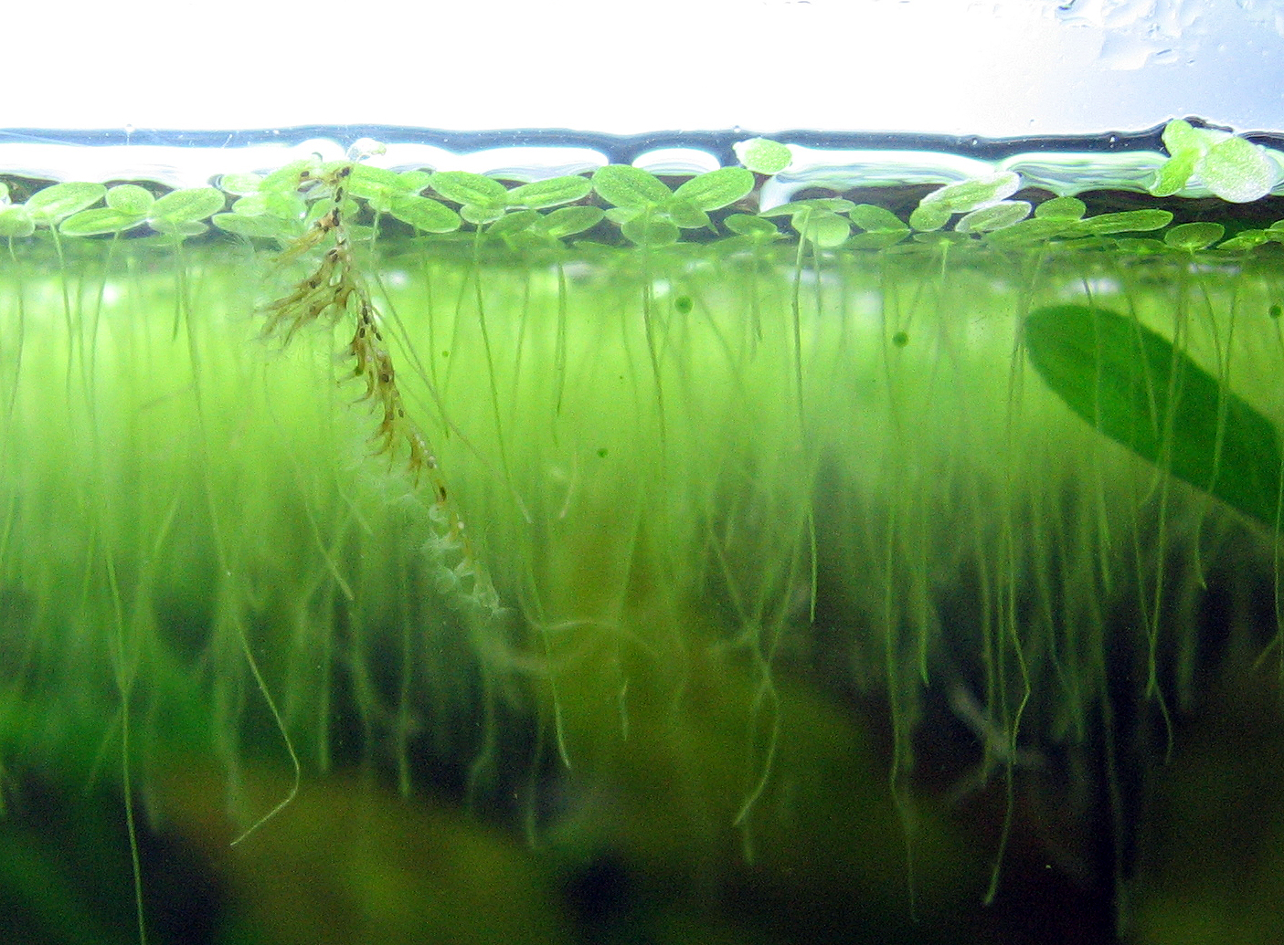 Moostierchen Süßwasser